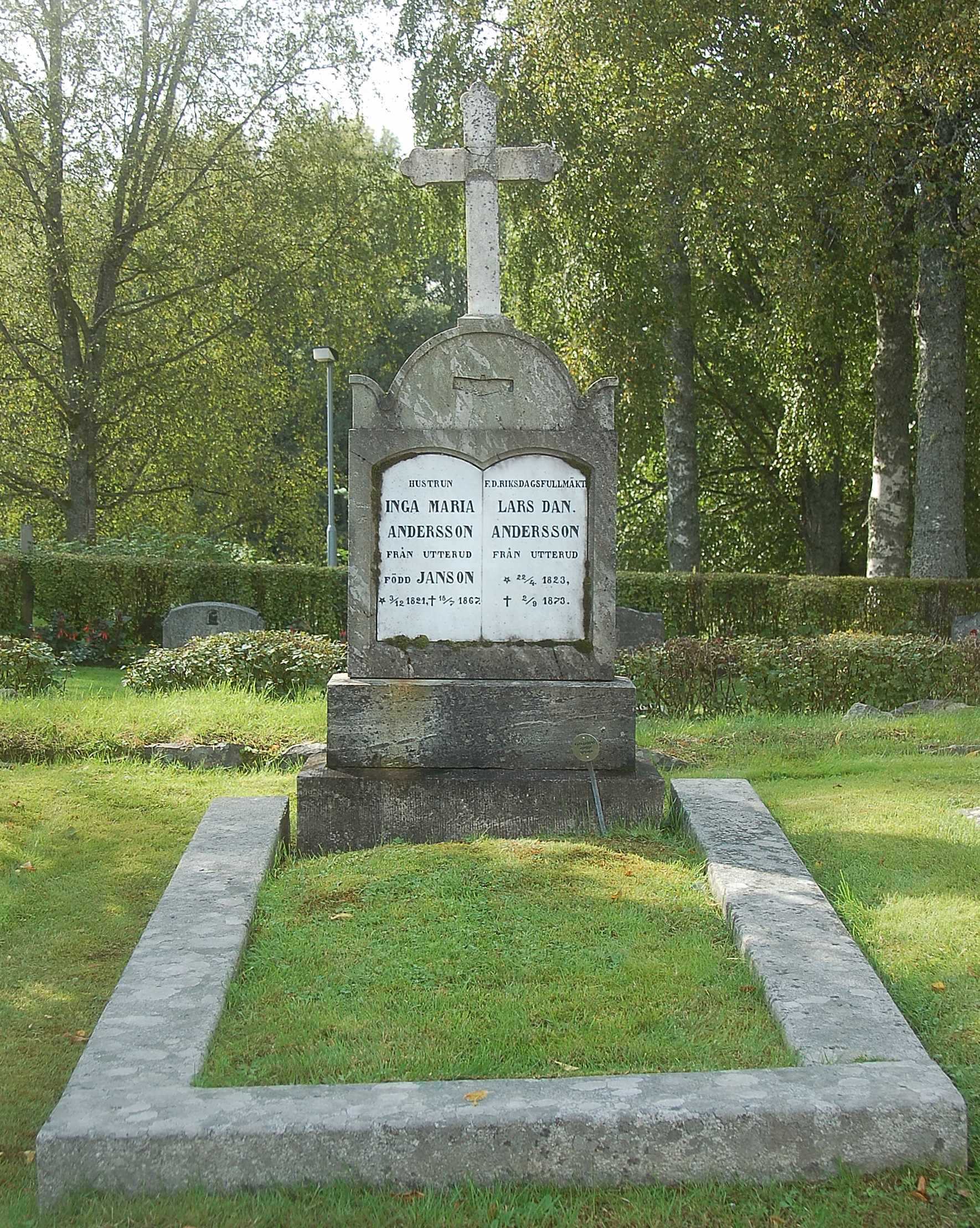 Minnsvård för rikdagsledamoten Lars Dan Andersson och hustrun Inga Maria Andersson på Nors kyrkogård.